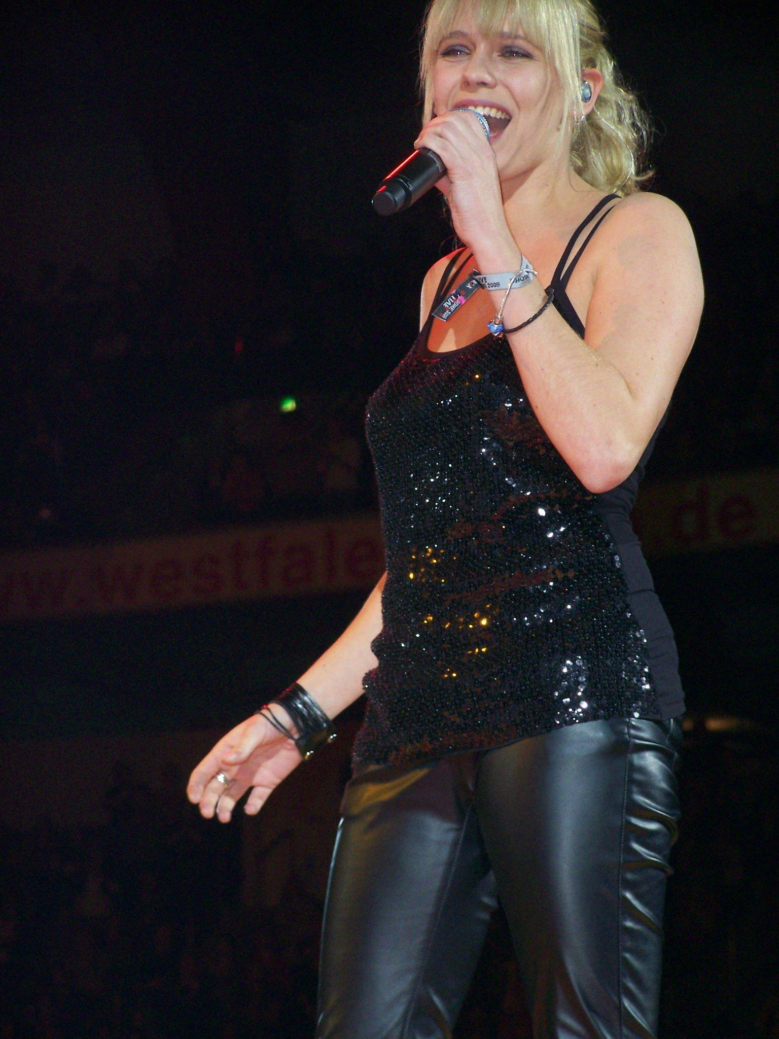 Sängerin "Jini" während eines Gastauftritts auf einem Pur-Konzert im Dezember 2009